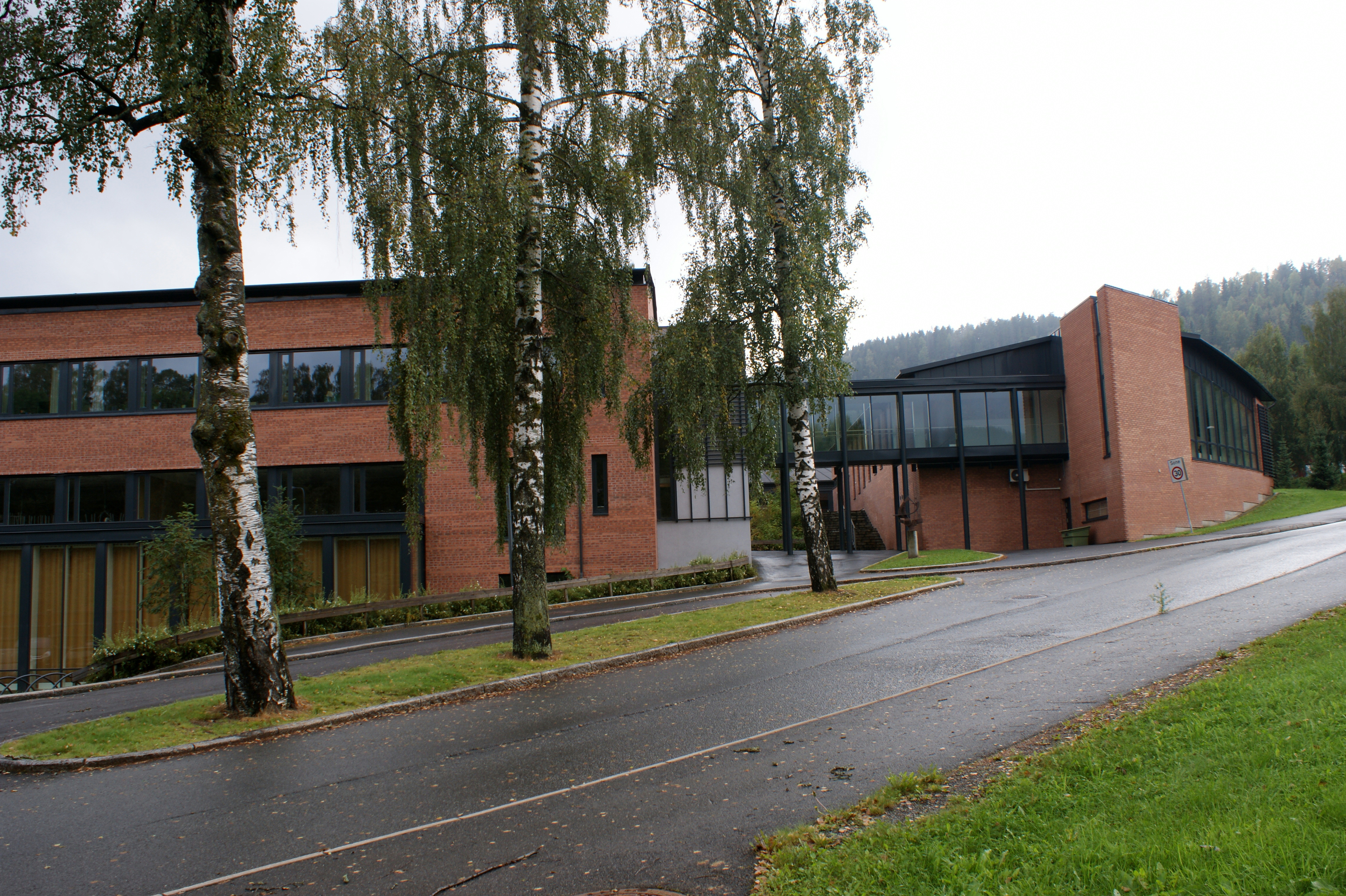 Skui skole, Bærum. Tatt i bruk 1901. Siste store ombygging 2005. Bildet tatt 2011.